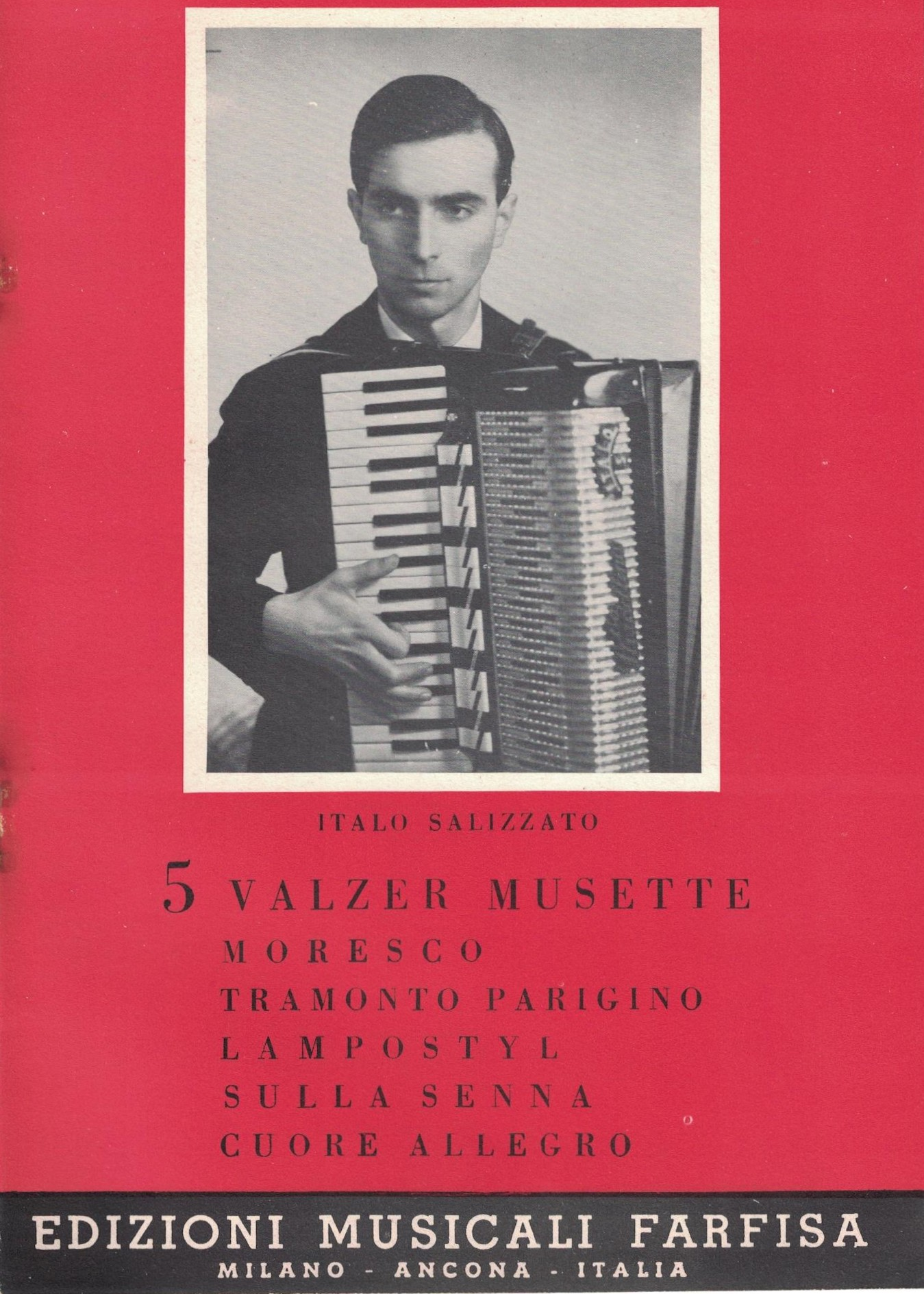 Vèneto: Una vecchia copertina di una stampa del 1963.